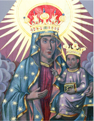 икона Матери Божией Ченстоховской в Камаях